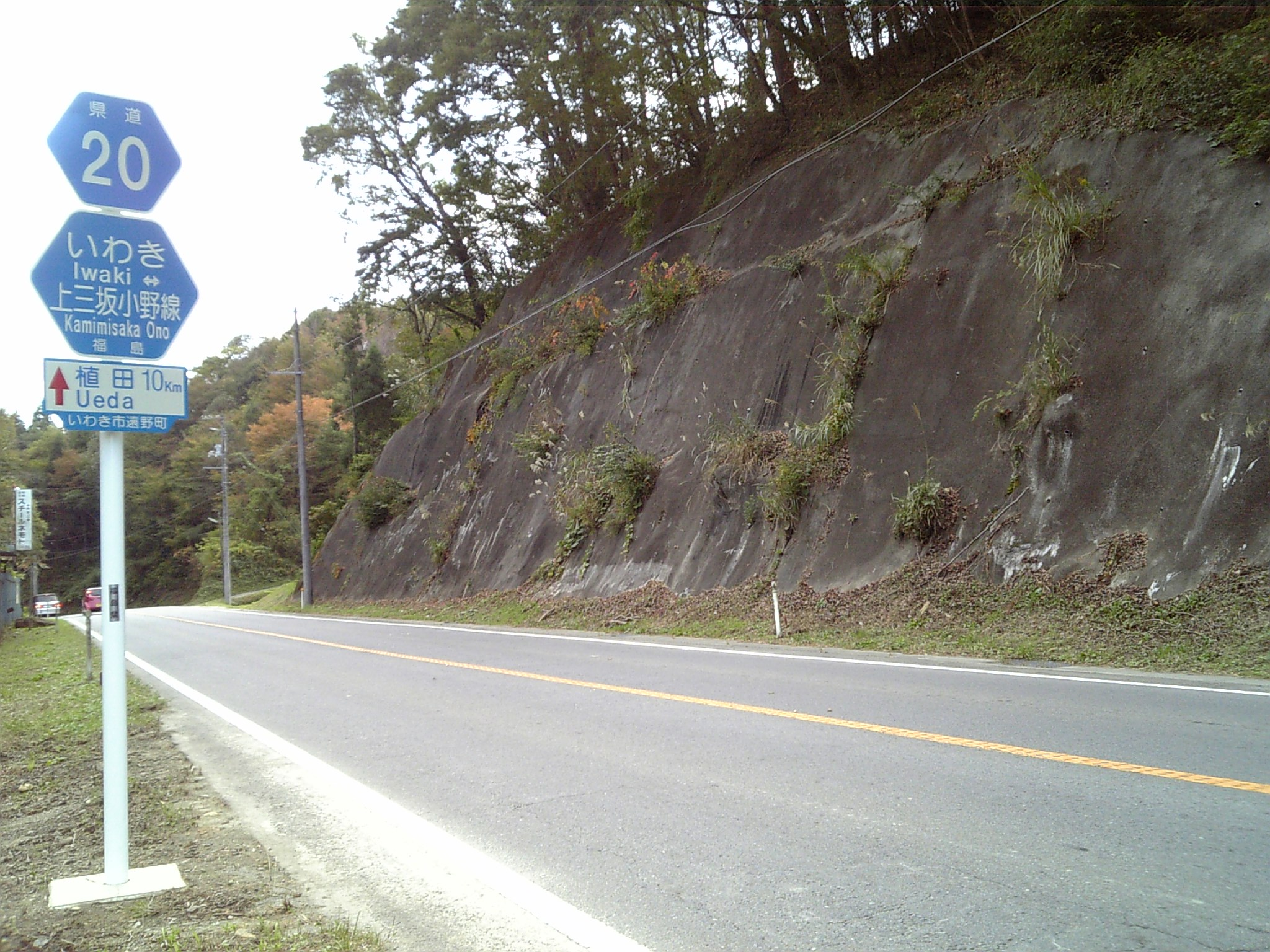 福島県道20号いわき上三坂小野線。いわき市遠野町滝付近。